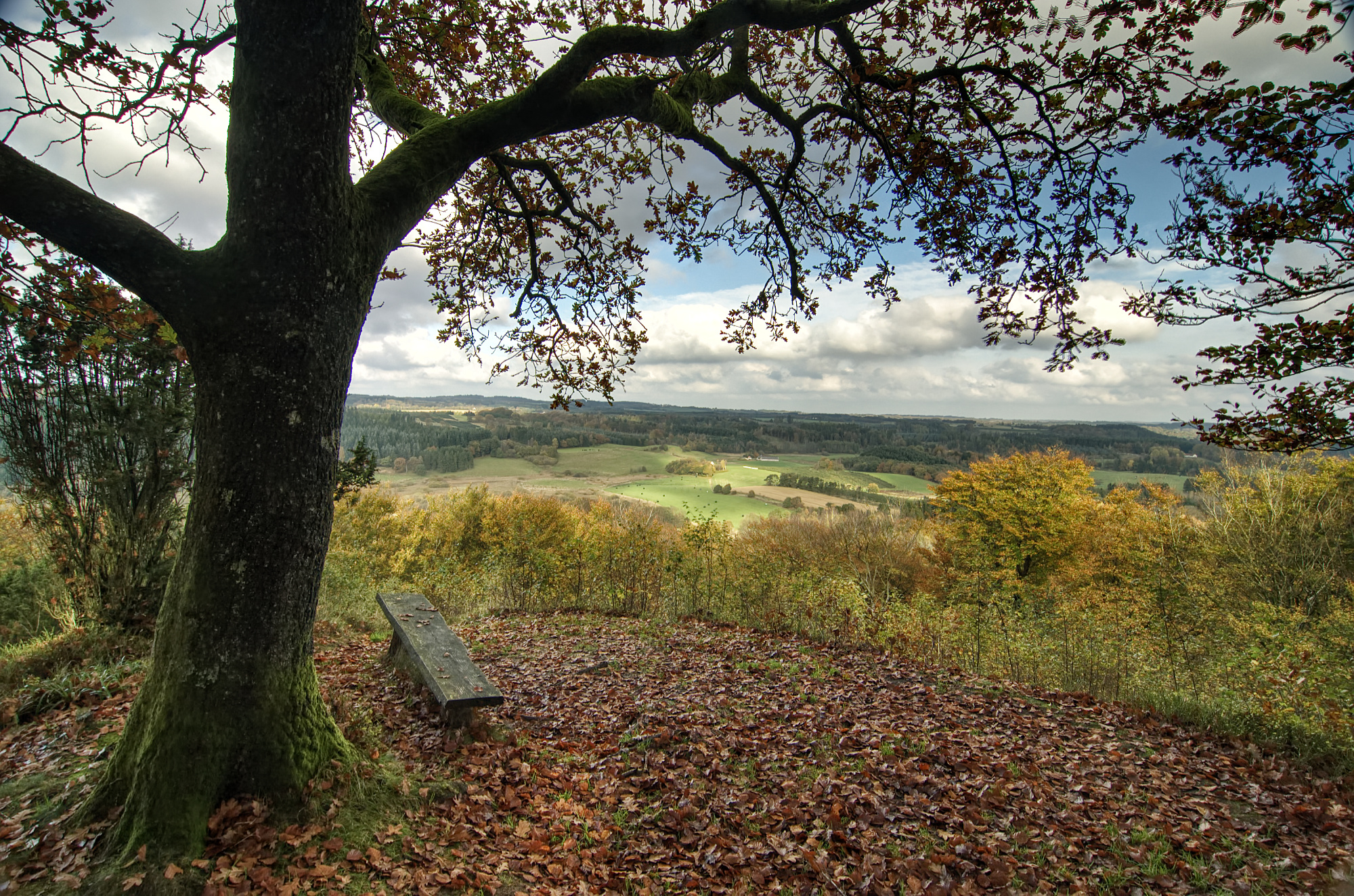 Udsigt fra Velling Kalv i Velling Skov.